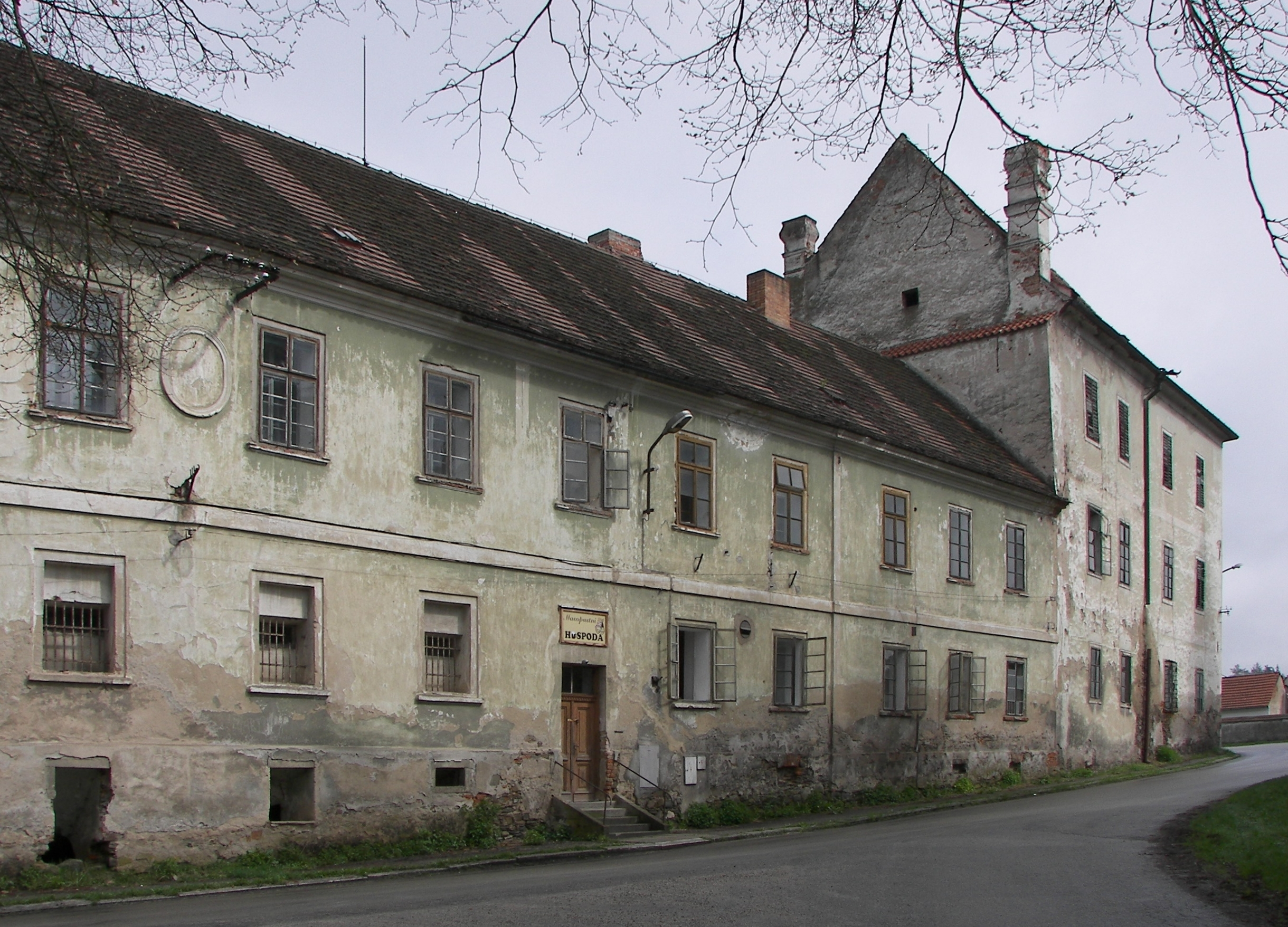 Komařice - zámek od odbočky k sýpce